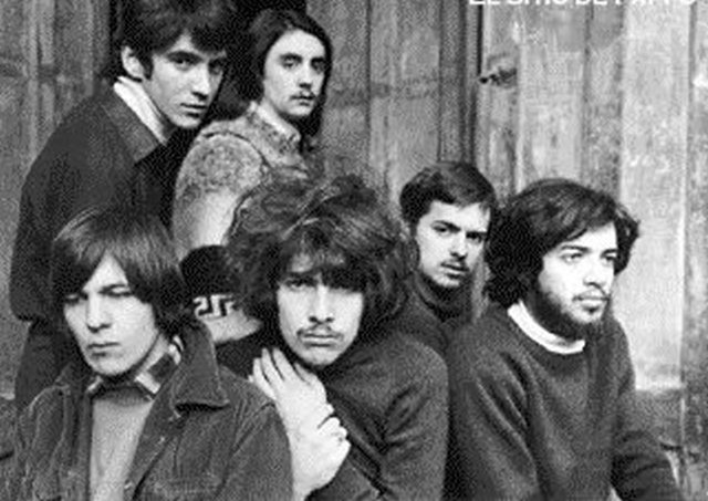 Primera formacion de Los Abuelos de la Nada